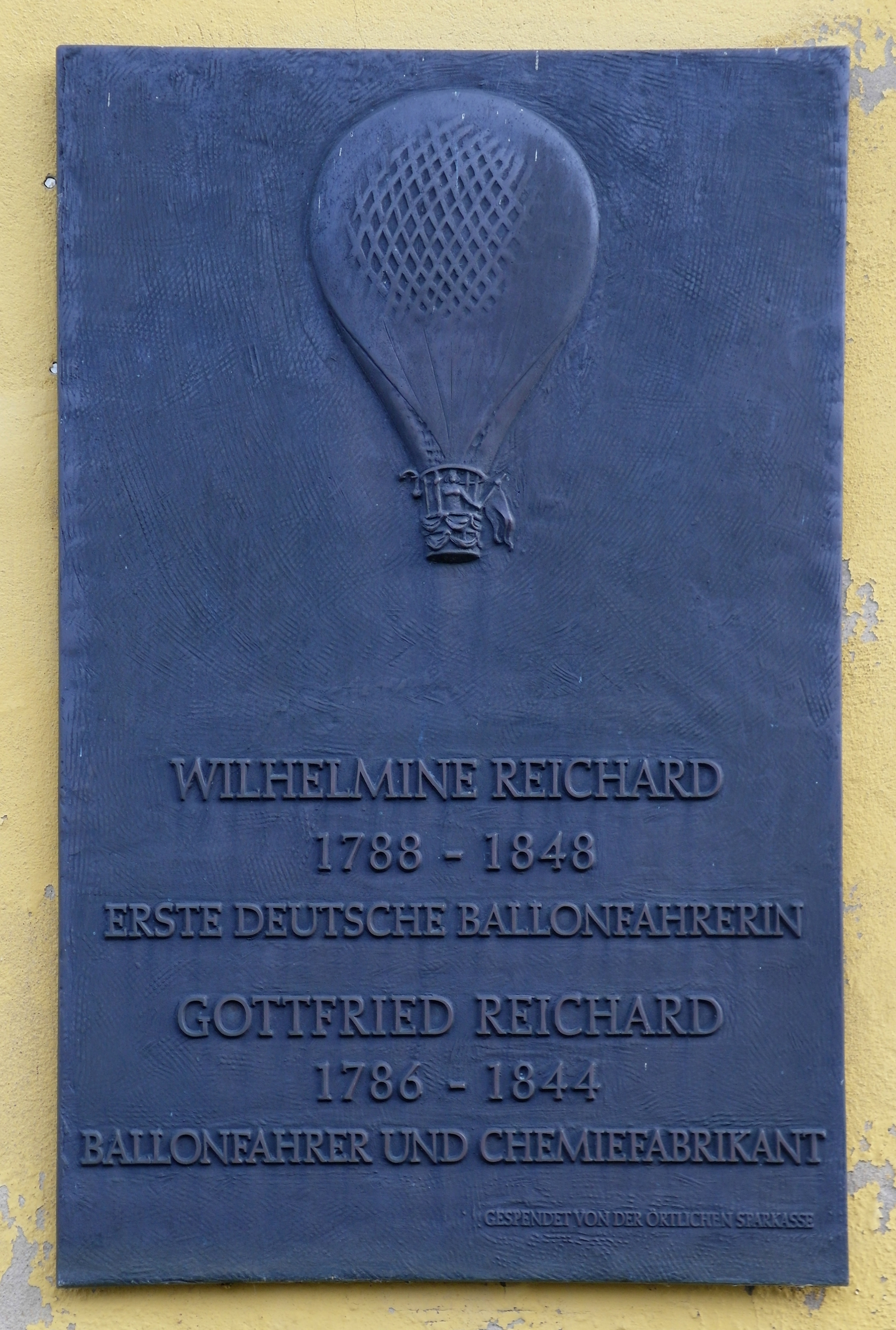 03.01.2018 01705 Freital-Döhlen: Gedenktafel Reichardstraße 9 (GMP: 51.007574,13.660712): In diesem Haus wohnte von 1814 bis zu ihrem Tode am 22.02.1848 Wilhelmine Reichard und ihr Mann Gottfried Reichard. Sie war die erste Ballonfahrerin Deutschlands. [SAM3429.JPG]20180103105DR.JPG(c)Blobelt